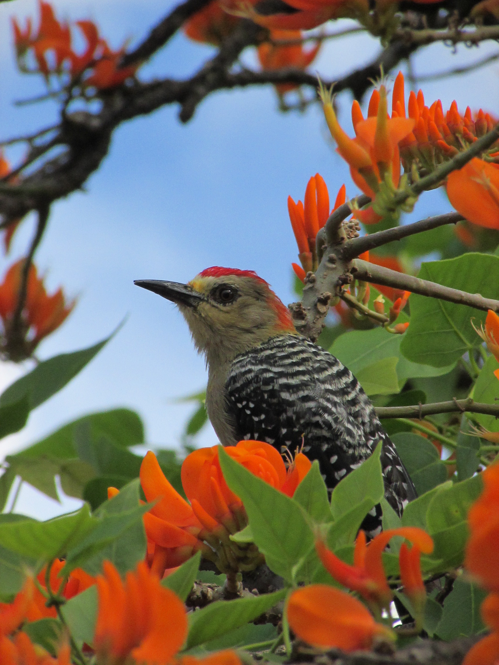 Un Carpintero Habado (Melanerpes rubricapillus) se asoma entre las hojas y primeras flores de un Bucare Ceibo (Erythrina poeppigiana). En gran parte del territorio nacional, durante ciertos periodos del año, es común observar a estos árboles vestirse de hermosas flores anaranjadas, ofreciendo néctar y sus brotes tiernos a diversos animales, entre ellos aves, pequeños mamíferos e insectos.